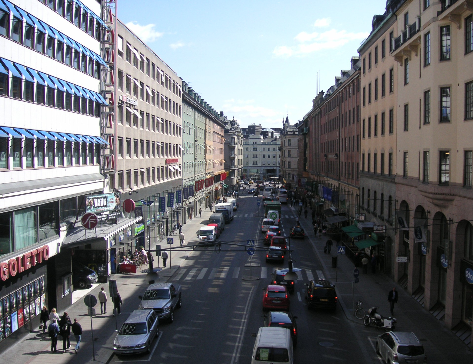 Kungsgatan i Stockholm